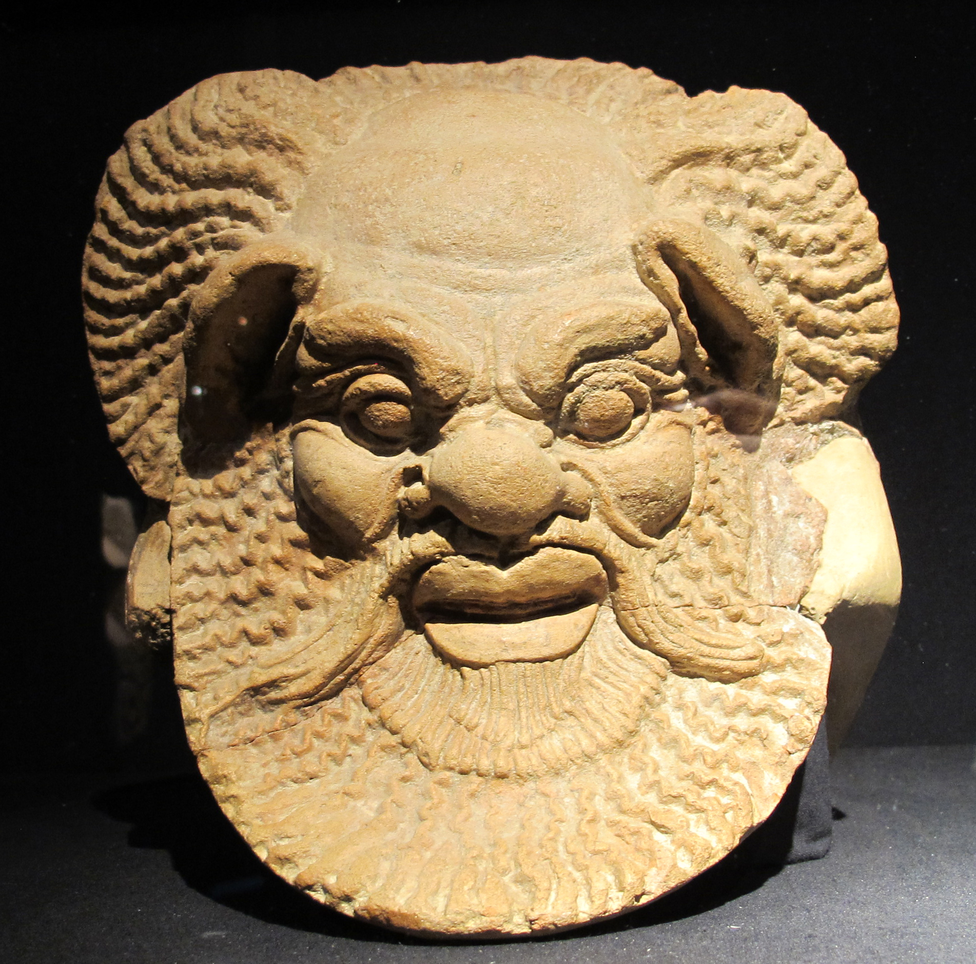 Monsters Exhibition (Palazzo Massimo, Rome, 2014)